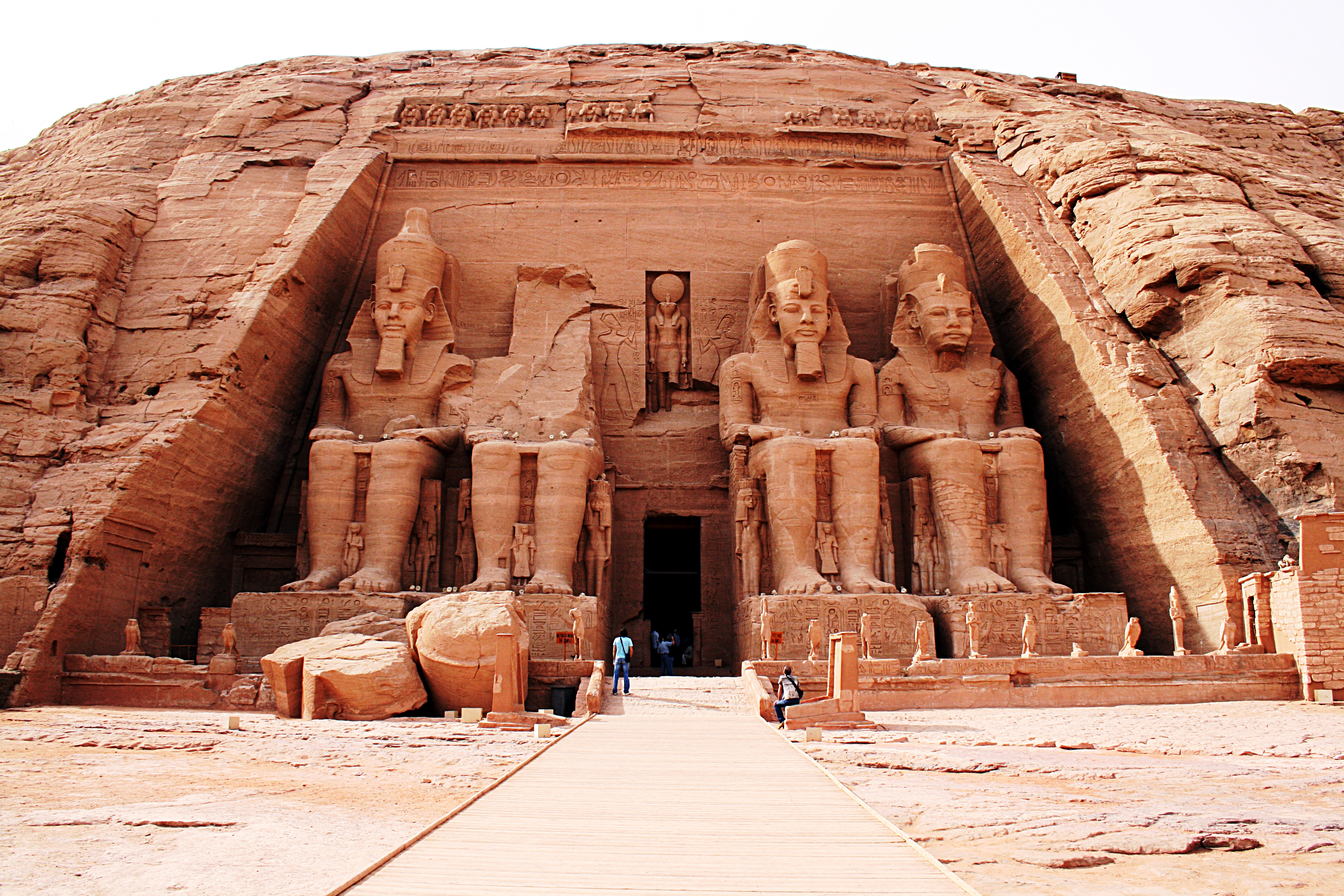 Abu_Simbel,_Großer_Tempel